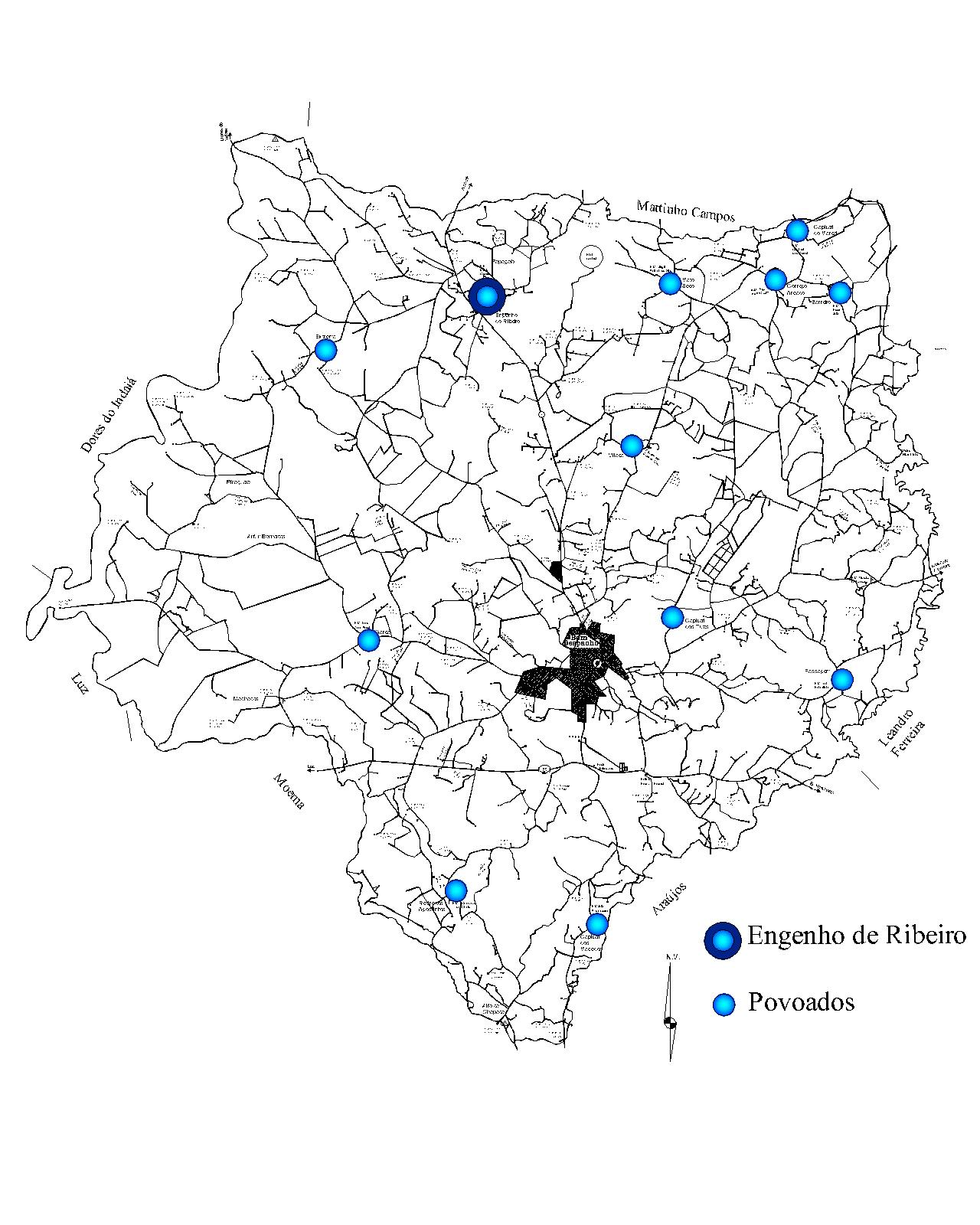 Mapa de Bom Despacho com distritos